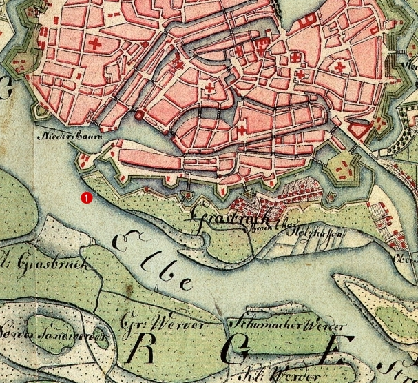 Altona, Hamburg, Harburg. Aufgenommen in den Jahren 1789 bis 1796 unter der Direktion des Majors Gustav Adolf von Varendorf durch Offiziere des Schleswigschen Infanterieregiments